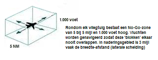 eigen tekening Ben Pirard